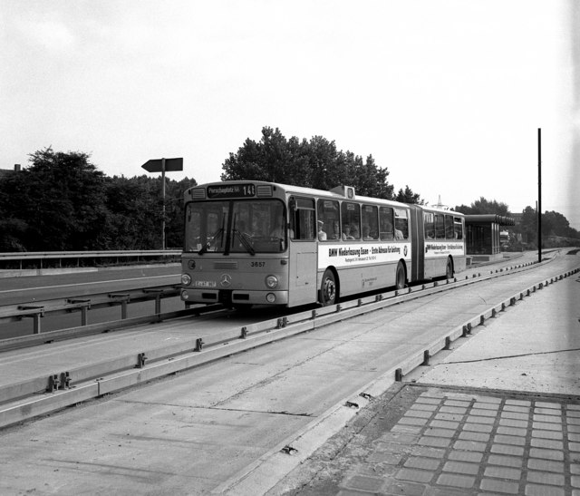 Duobus at Frillendorferplatz, Essen